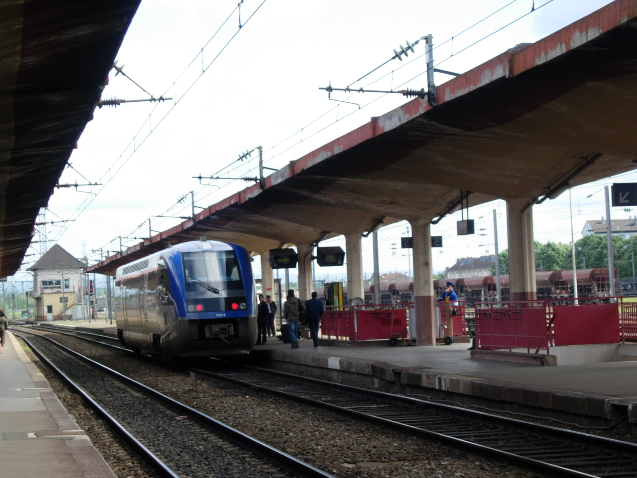 Autorail X 73500, gare de Belfort/Belfort station, France